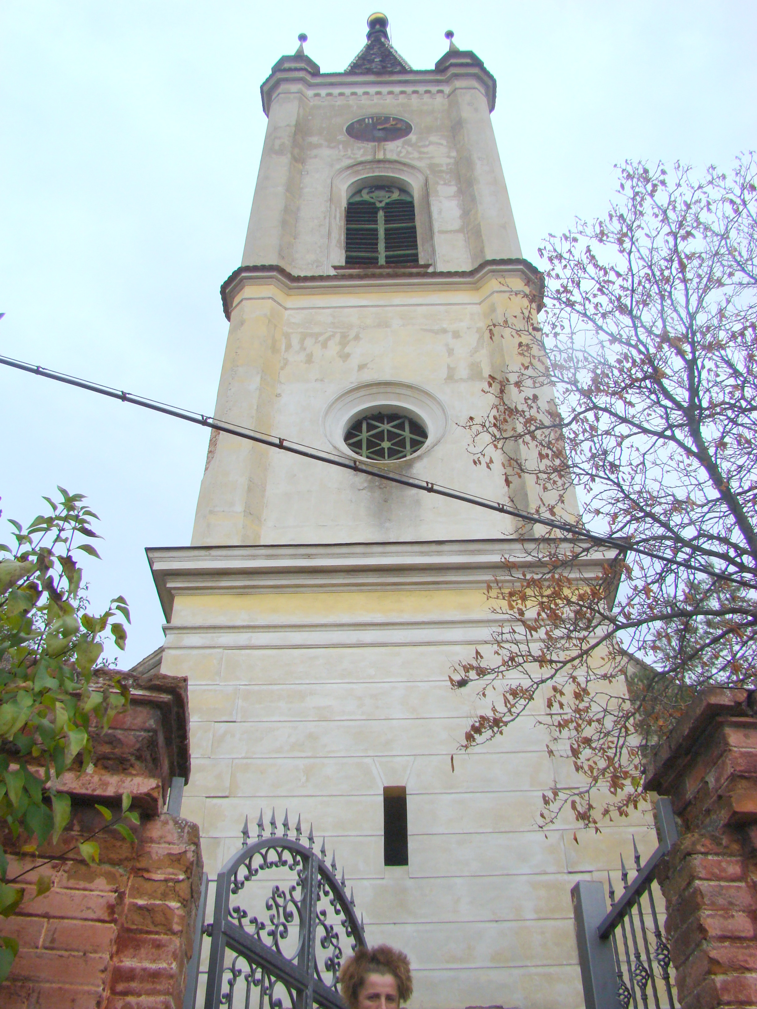 Apoldu de Sus, Sibiu